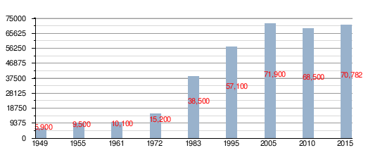 évolution de la population de la ville de Ra'anana